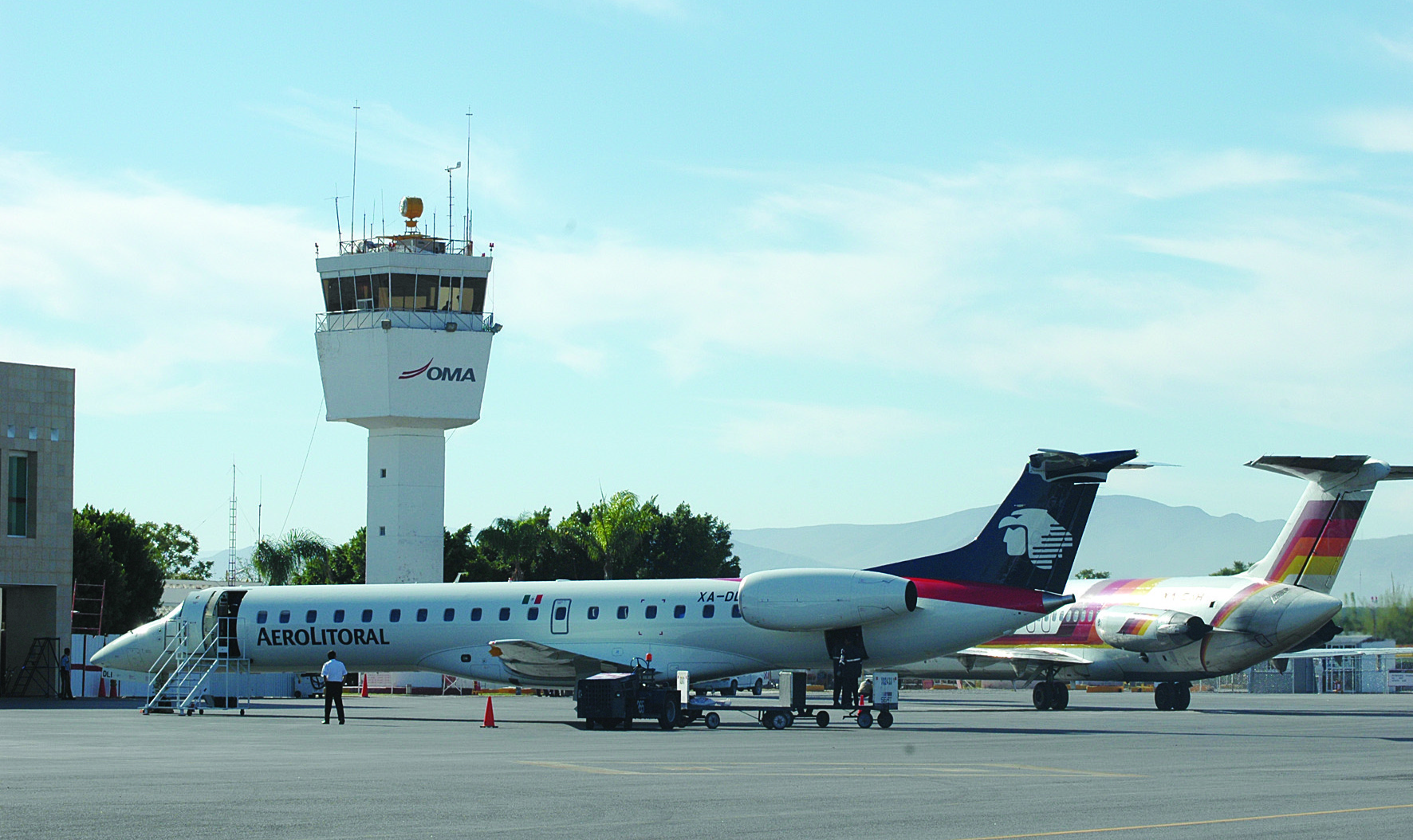 Fotografia tomada en la plataforma del Aeropuerto Internacional Francisco Sarabia de Torreón.